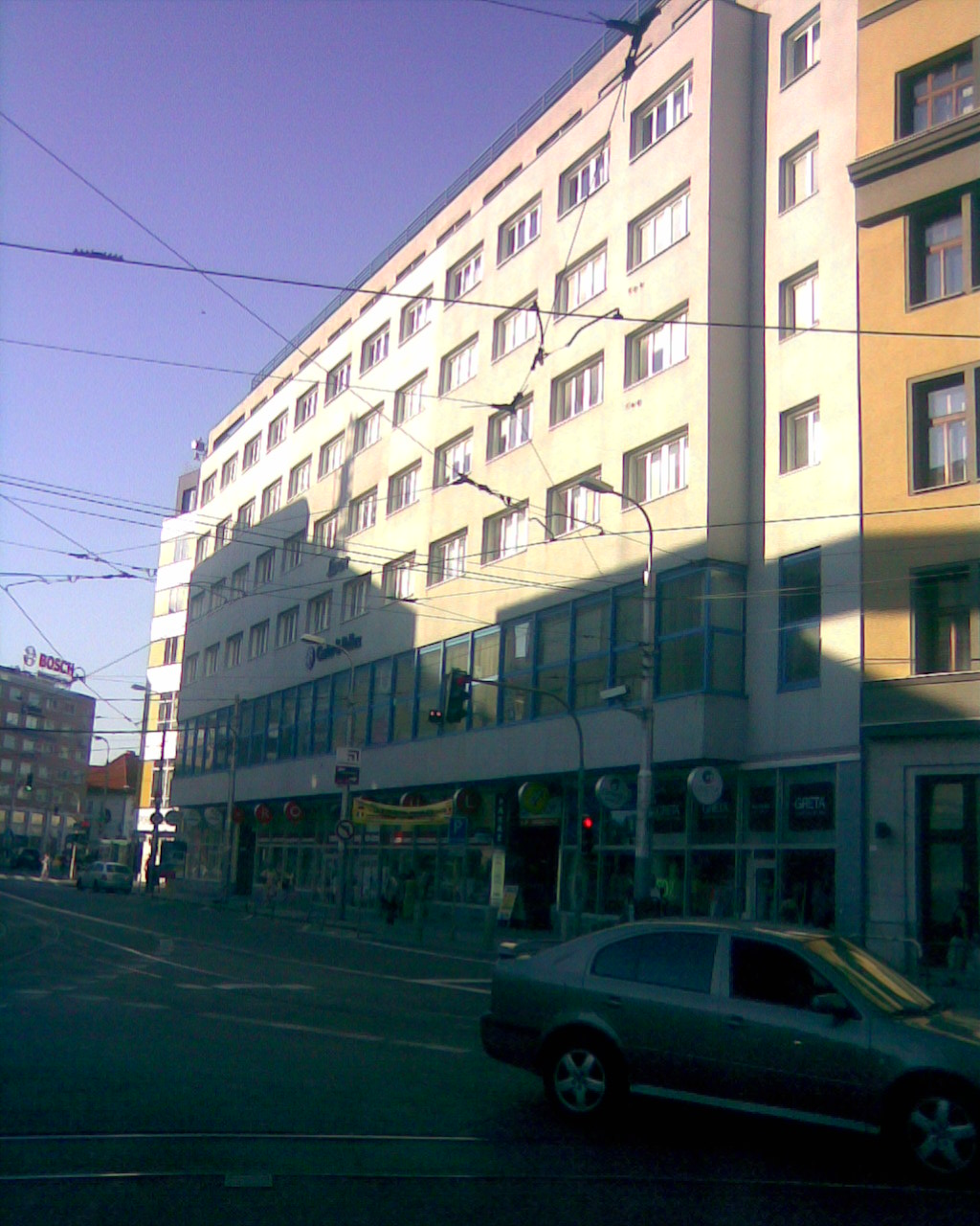 Obchodný_a_obytný_dom_Luxor